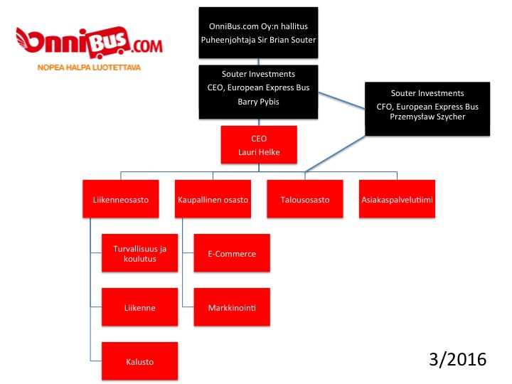 Oy:n organisaatiokaavio 3/2016